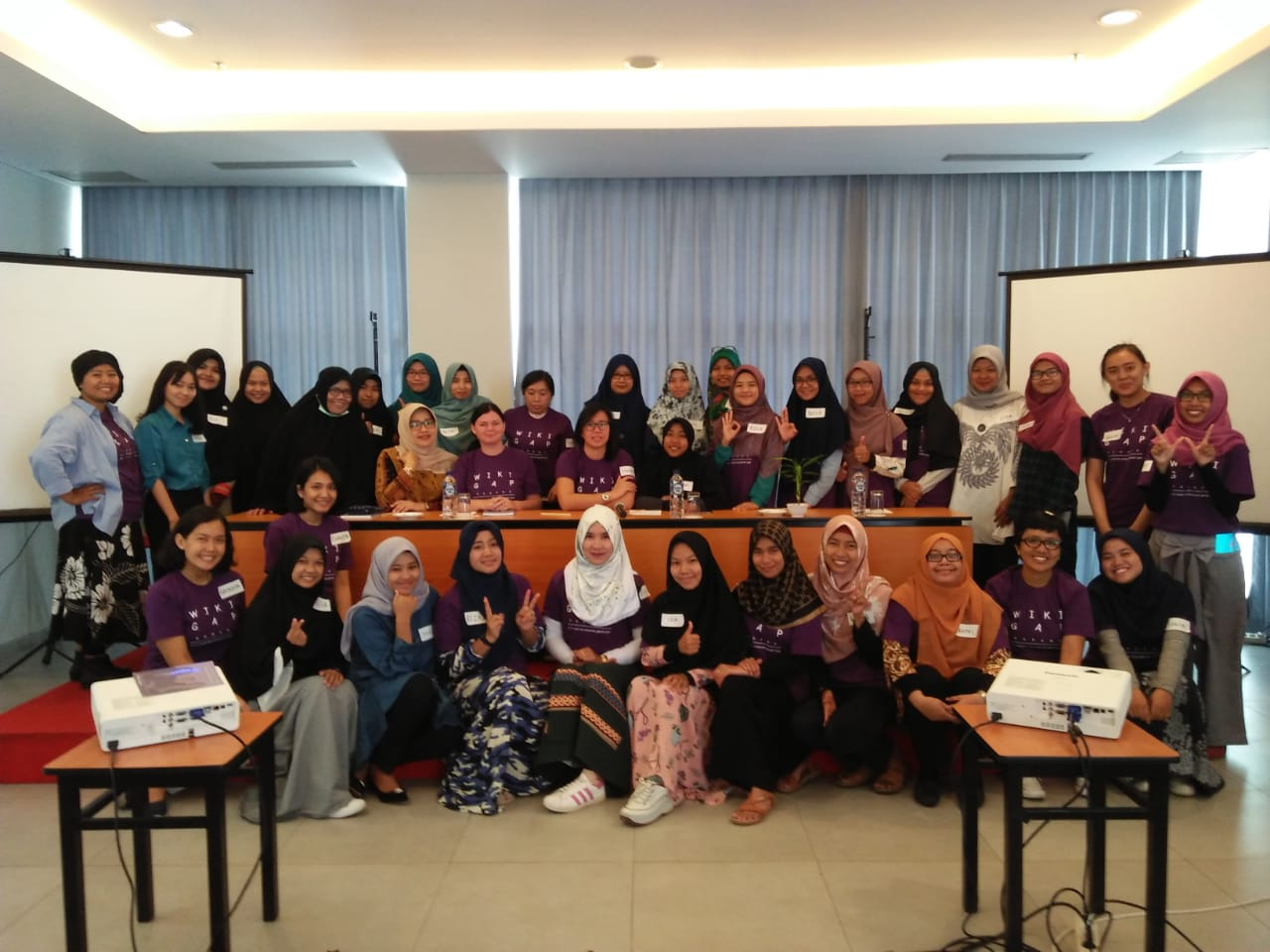 WikiGap Padang Pembukaan